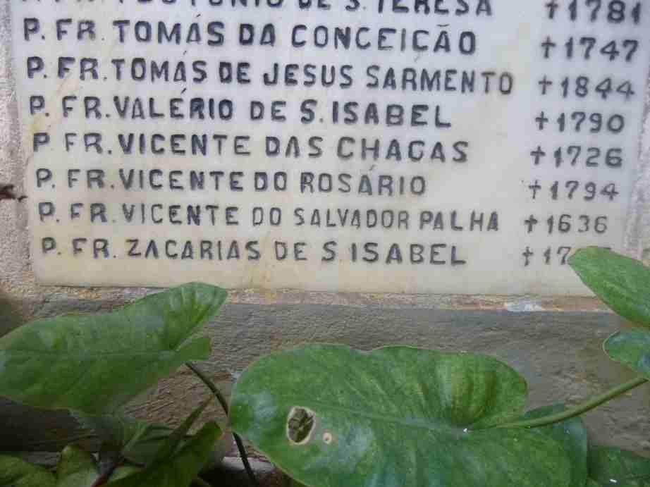 Grabinschrift